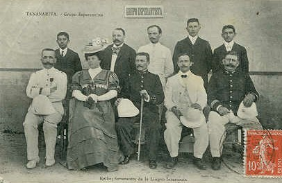 La Esperanto-grupo de Antananarivo. Bildkarto de 1906.